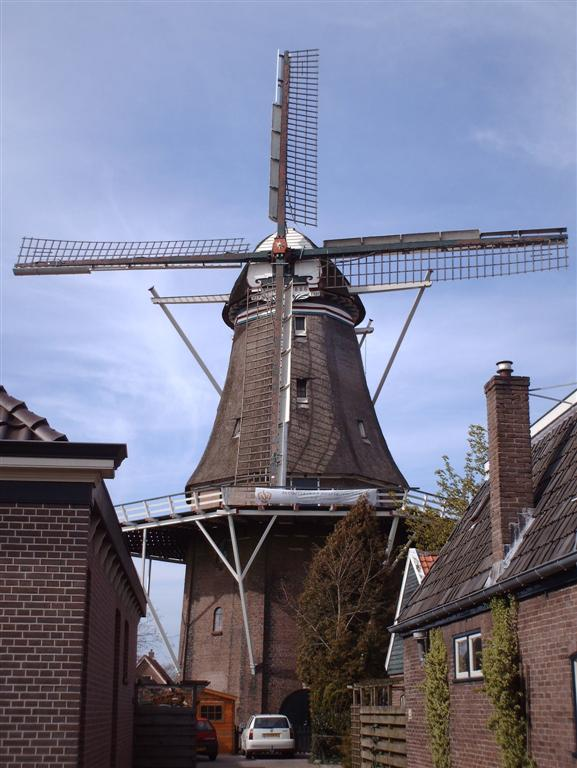 Molen Windlust in Wolvega